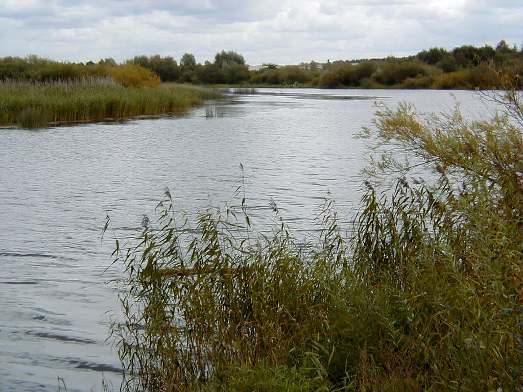 Jugla pie ietekas Juglas ezerā 2000-09-10